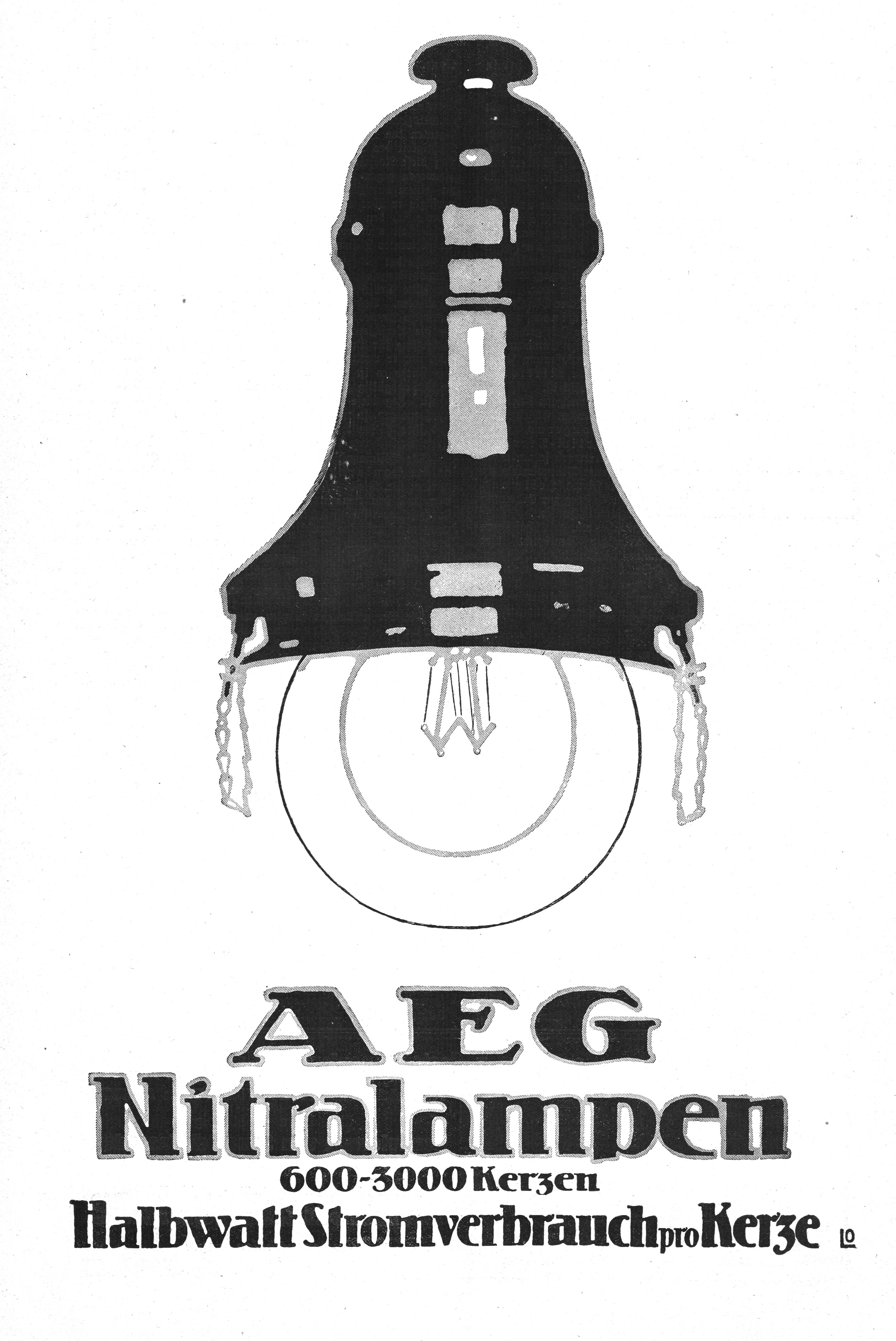 Ganzseitige Werbeanzeige der AEG für ihre Nitralampen in der Zeitschrift Bauwelt